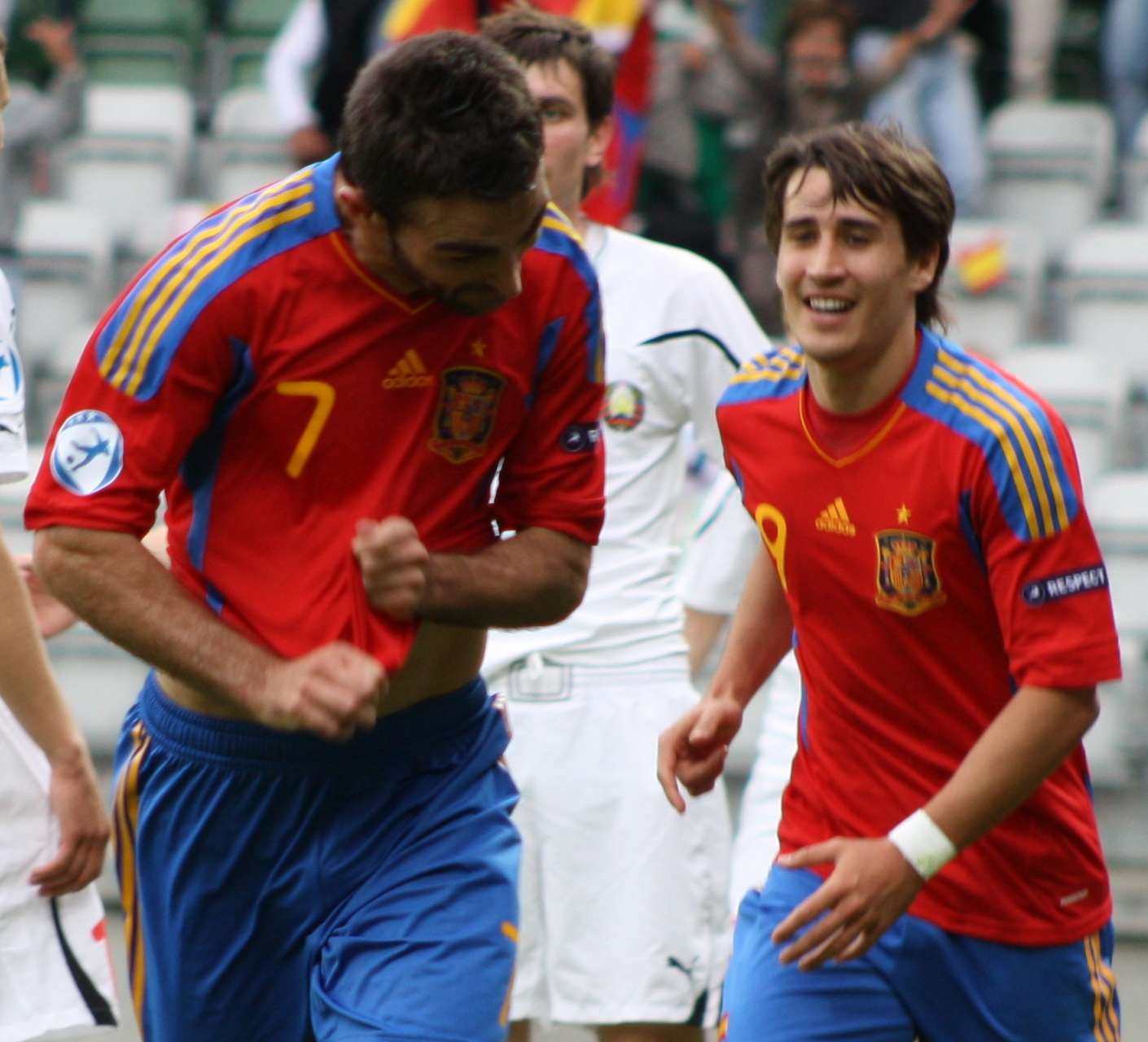 Adrian López and Bojan